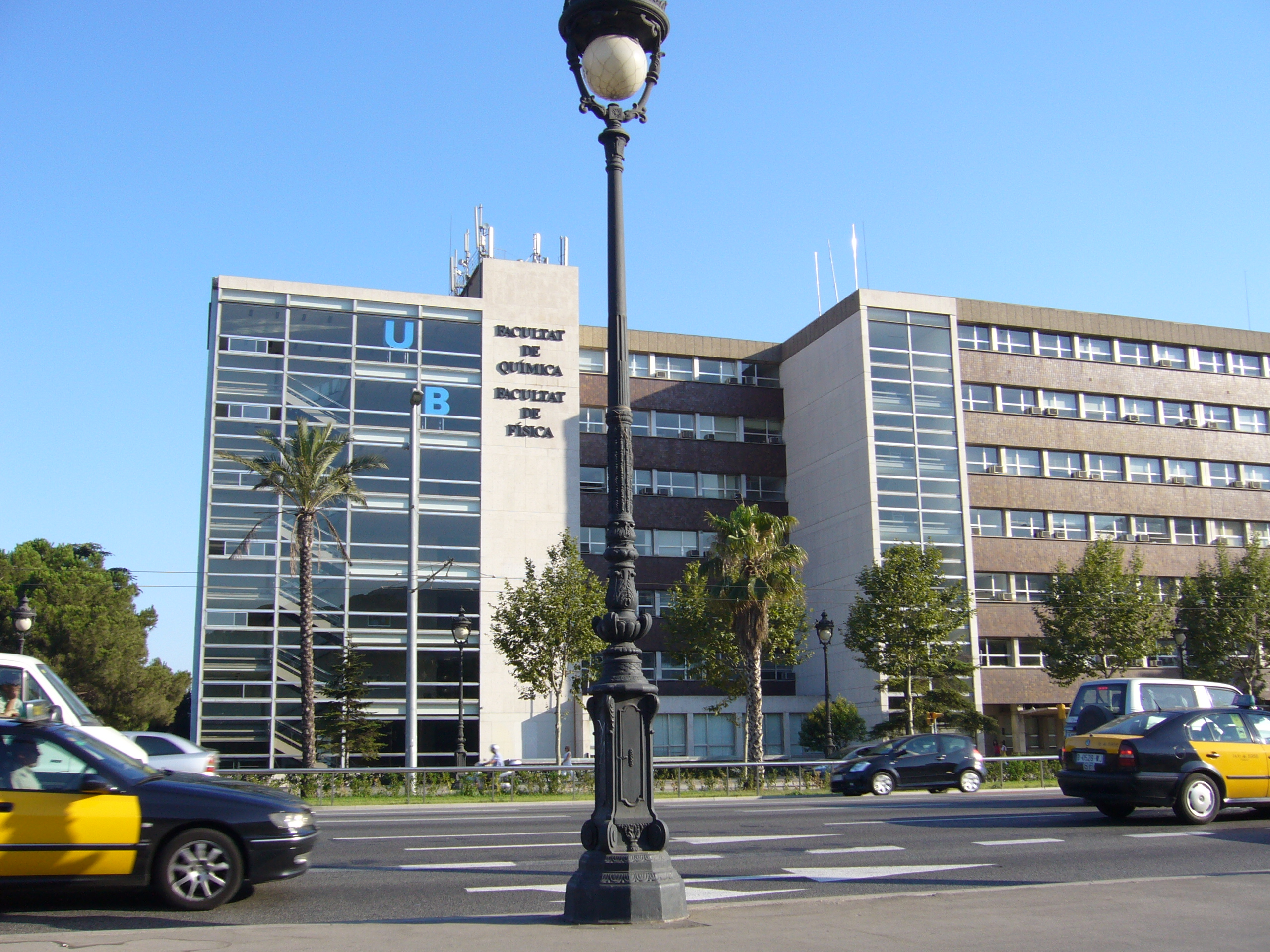 Facultat de Química UB